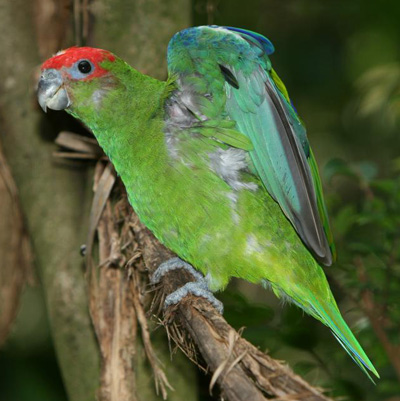 Male Pileated Parrot (Pionopsitta pileata) Parque de Aves, Foz do Igauzu, Brazil